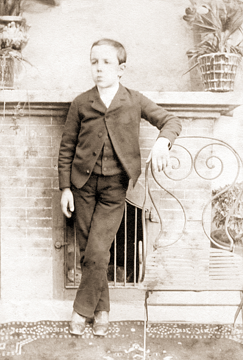 Francesc Brosa i Marroig (en una foto de 1888), único hijo varón de Francesc Brosa i Casanobas. Padre de Francesc Brosa i Palau, padre de Francesc Brosa del Pozo. La tradición de dar el nombre Francesc al primer hijo varón en la familia Brosa tenía una historia de siglos.